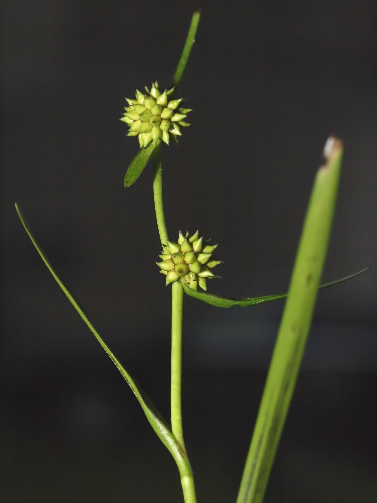 Zwerg-Igelkolben Sparganium natans